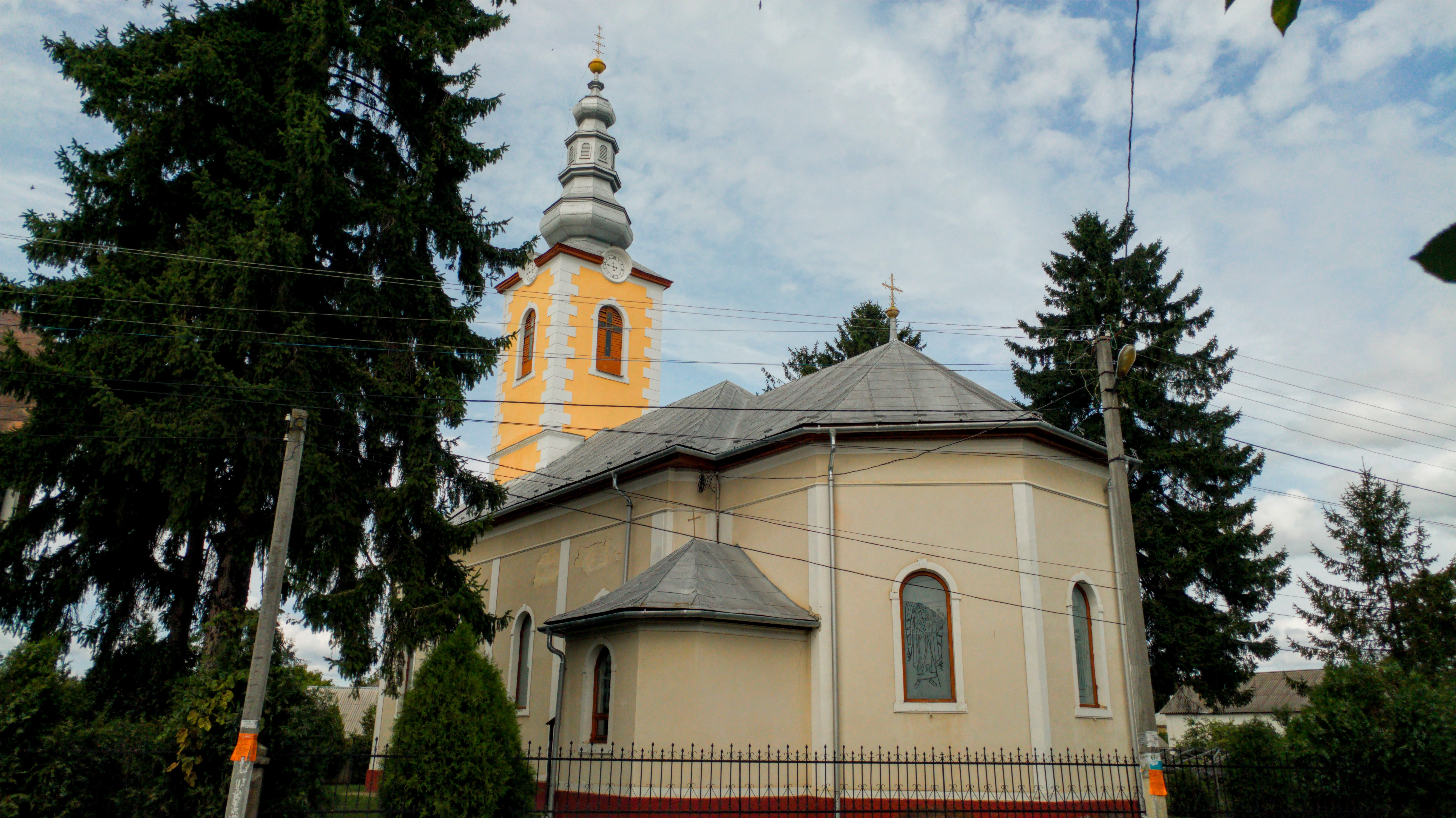 Gorögkatolikus templom Mátyfalván, felújítva.